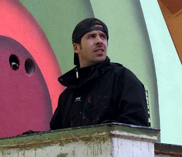 Streetartista Jan Kaláb během malby ve Strašnicích v Praze 10. Duben 2013.